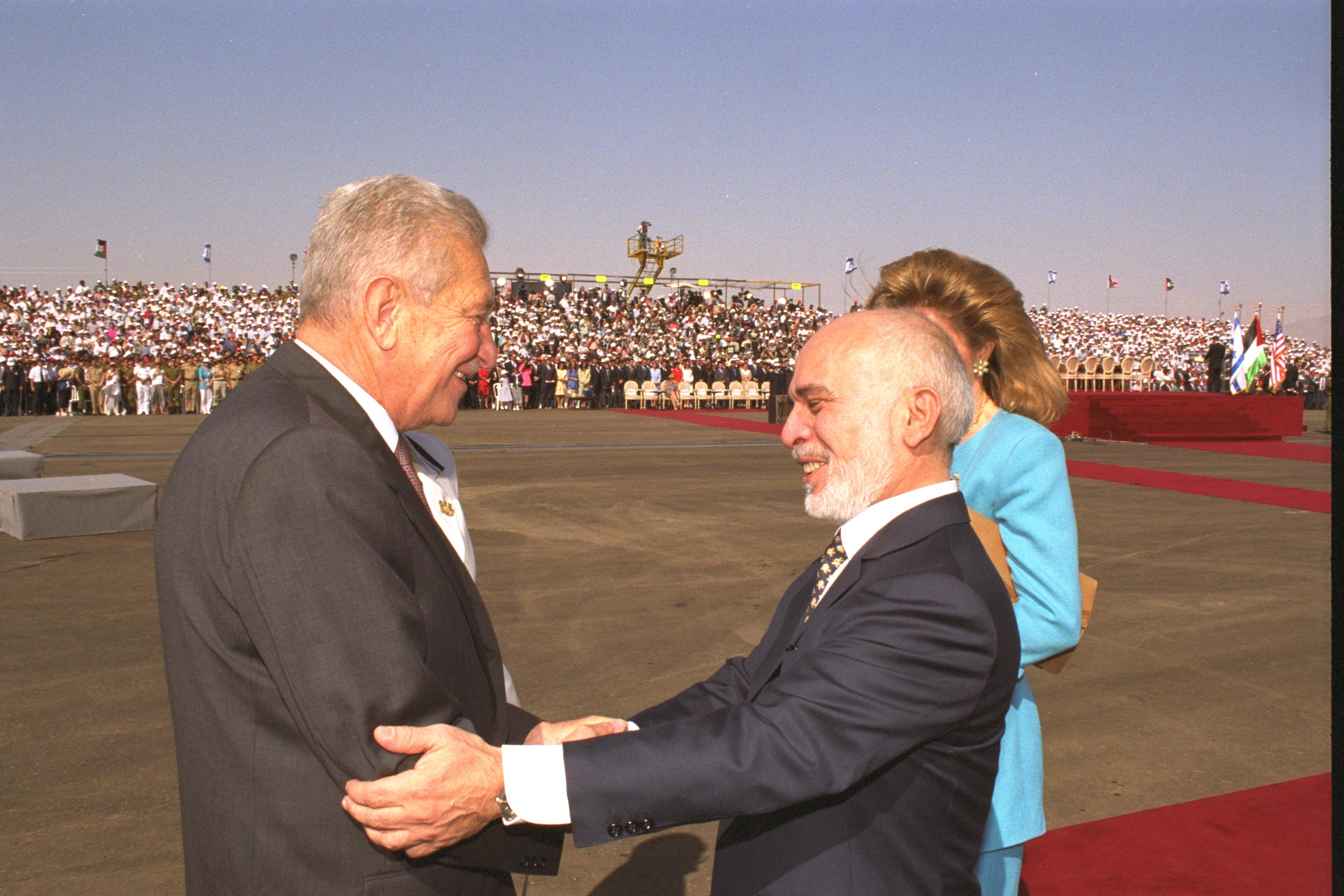 Pres. Ezer Weizman and Jordan's King Hussein greet each other at the Arava Border Terminal prior to the signing of the peace treaty between their countries. נשיא המדינה עזר ויצמן לוחץ ידו של חוסיין מלך ירדן בהגיעו לטקס חתימת חוזה השלום בין ישראל לירדן במסוף הערבה ליד אילת ועקבה. Photo: SAAR YAACOV, 10/26/1994